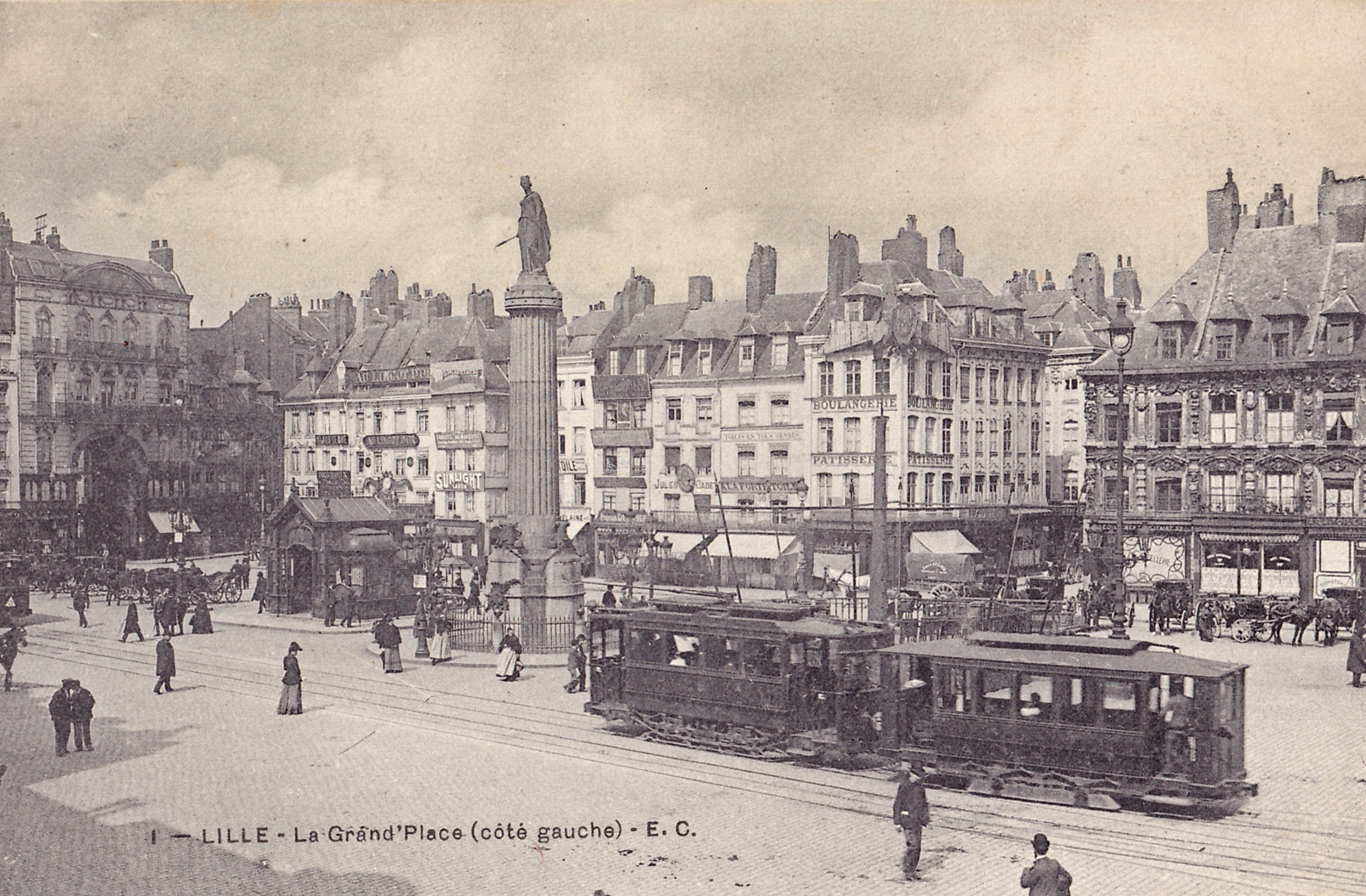 Carte postale ancienne éditée par E. C., n°1 : LILLE - La Grand'Place (Coté gauche)